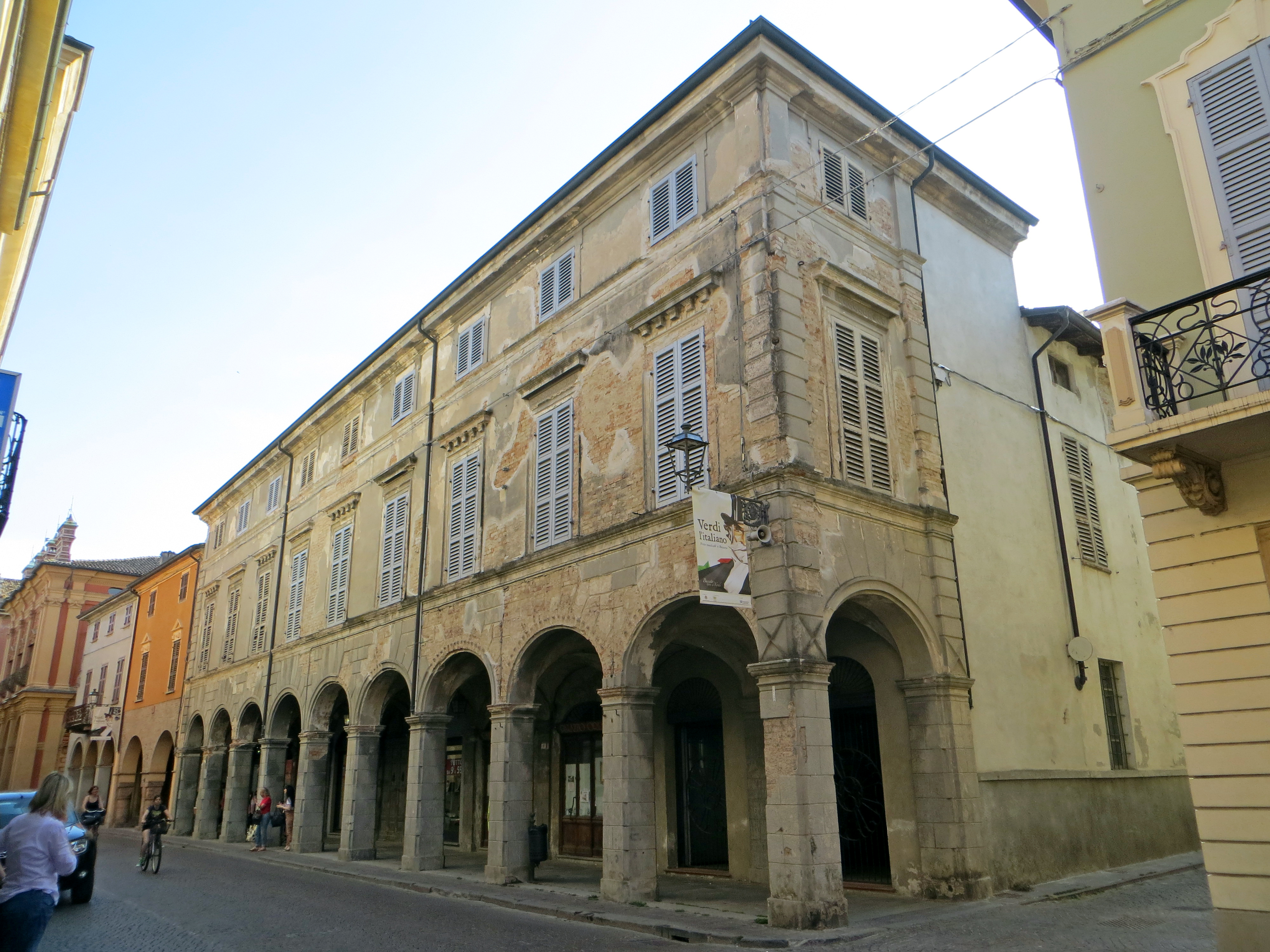 Palazzo Orlandi (Busseto) - facciata